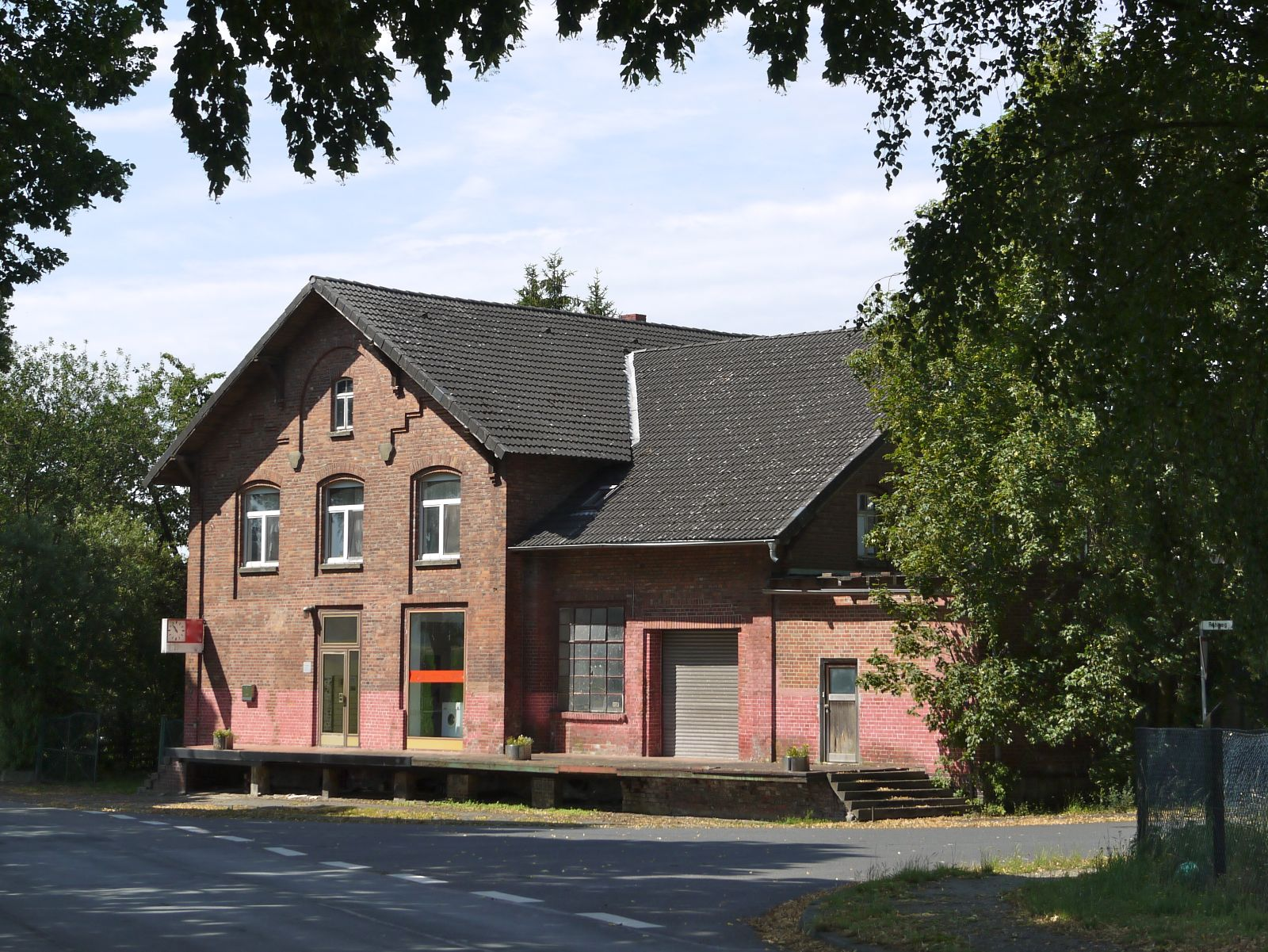 Gebäude der ehemaligen Molkerei in Salzgitter-Ohlendorf